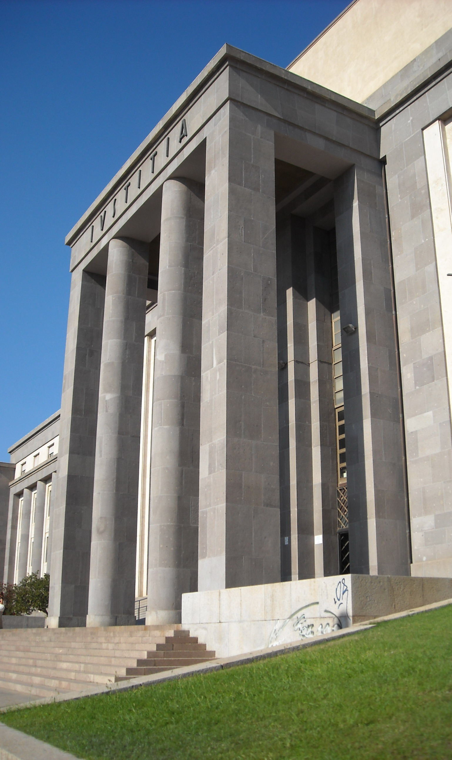 Palazzo di Giustizia di Cagliari (edificato negli anni '30)